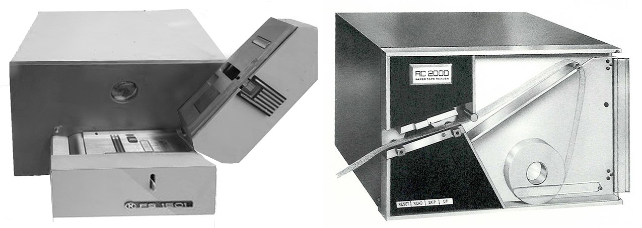 Rychlé optické čtečky děrné pásky